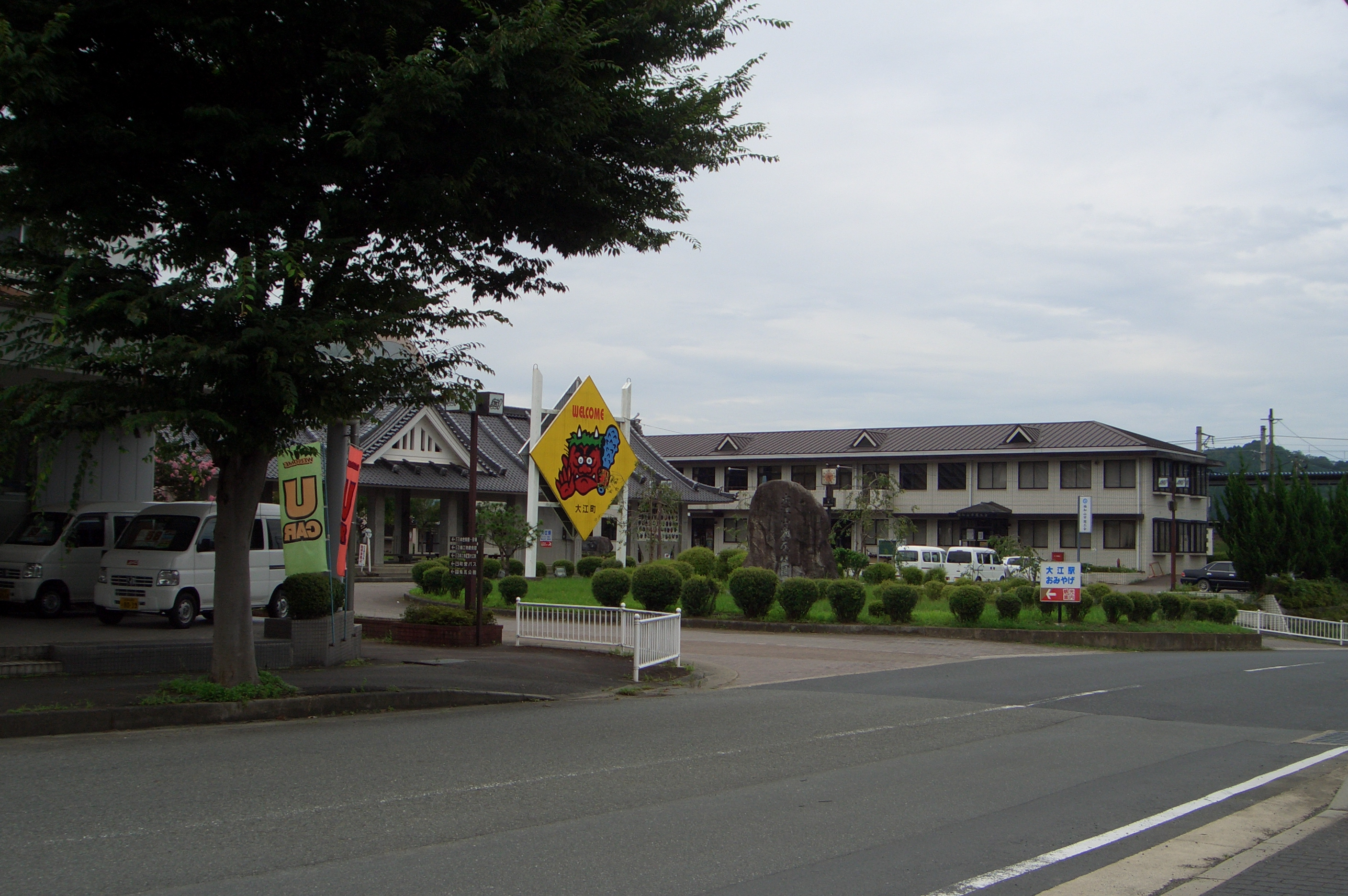 北近畿タンゴ鉄道宮福線大江駅駅前。京都府福知山市。